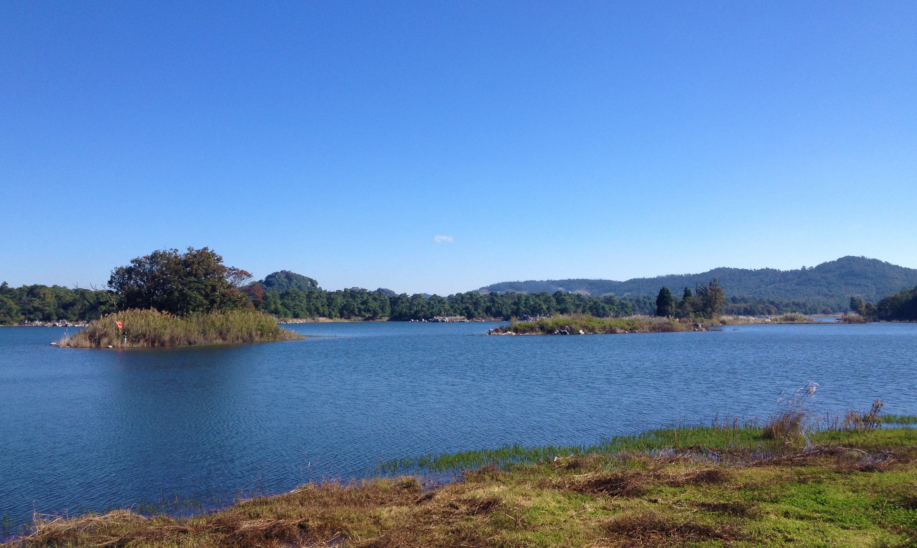 云南石林县境内的长湖，属于石林（省级）自然保护区的一部分。